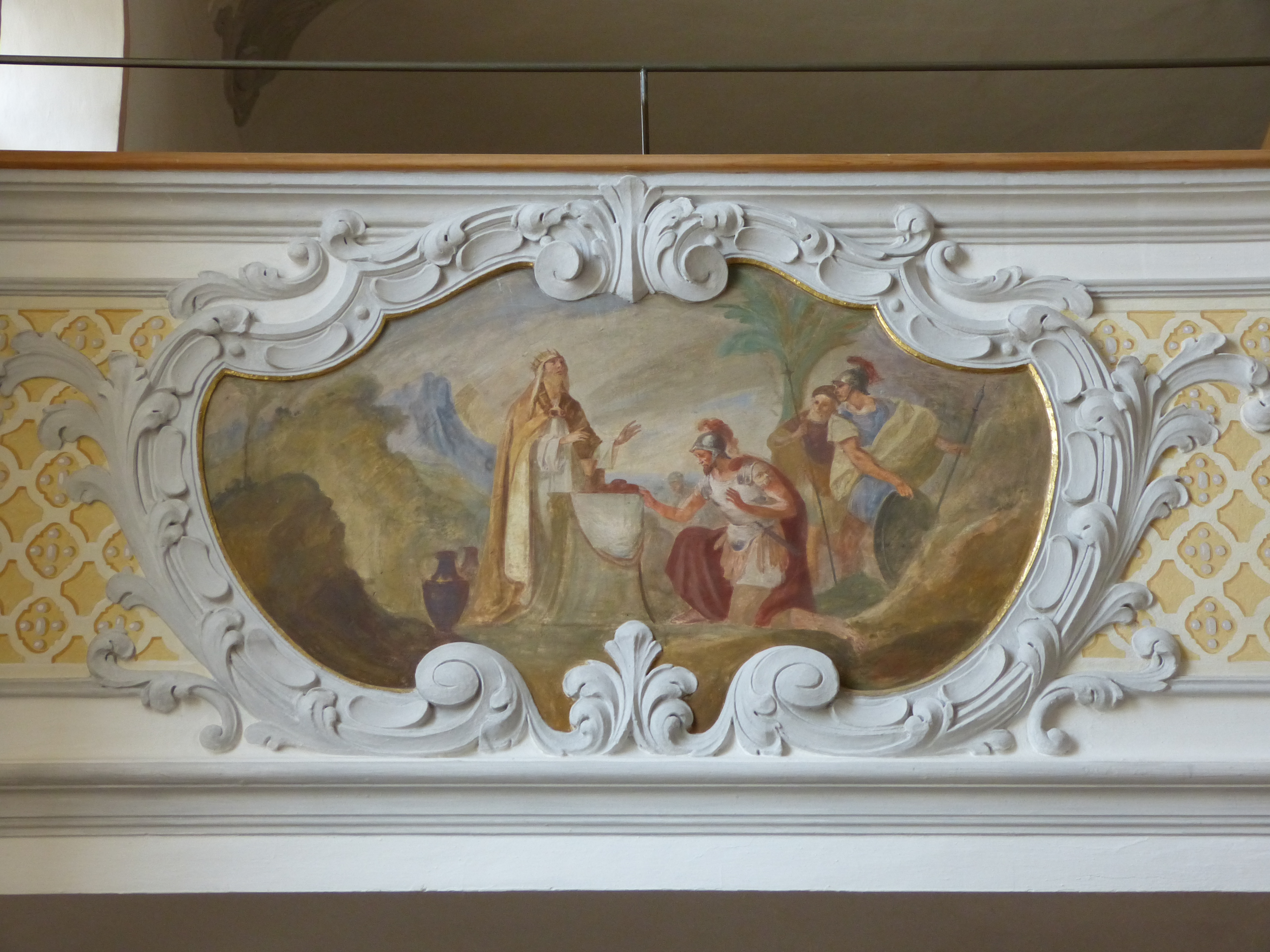 Malerie an der Emporenbrüstung von St. Afra Betzigau, Landkreis Oberallgäu, Bayern. Dargestellt sind Abraham und Melchisedek